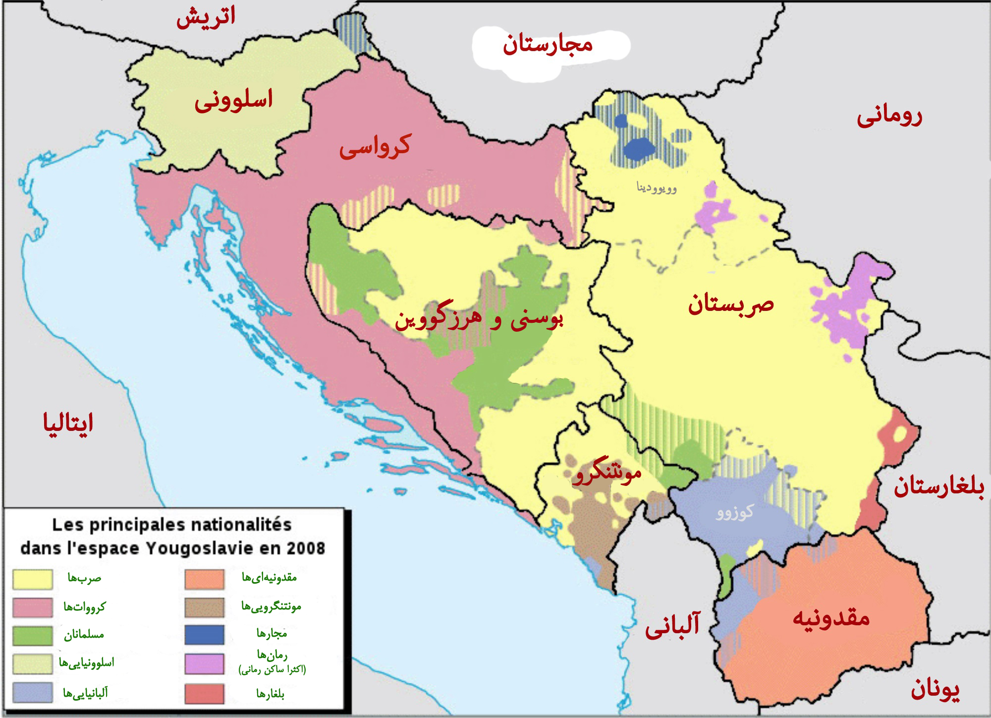 نقشه‌ی پراکندگی سیاسی شاخه‌های مختلف نژاد اسلاو